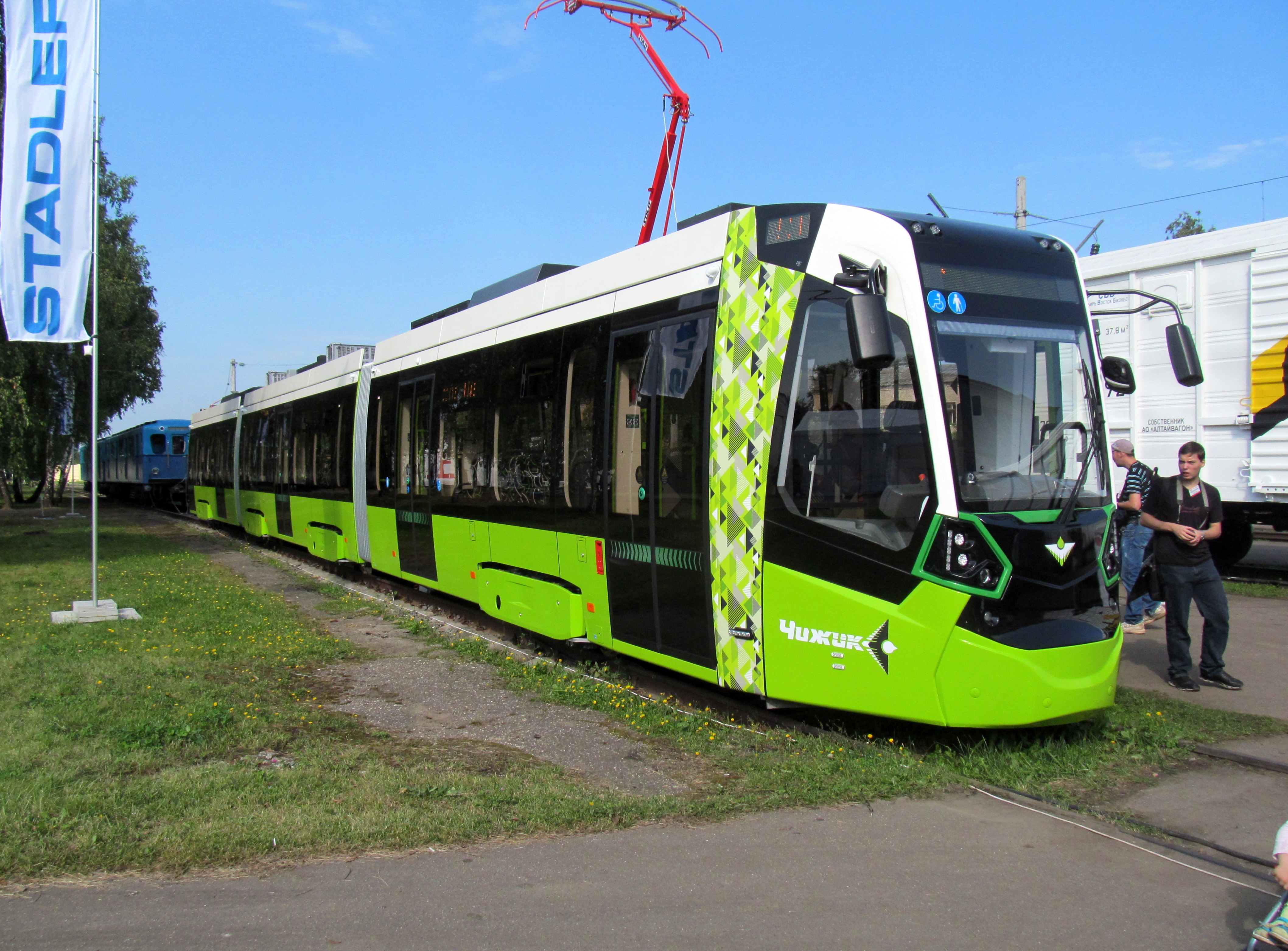 Трамвайный сочленённый вагон Stadler B85600M "Чижик" на международном салоне ЭКСПО-1520